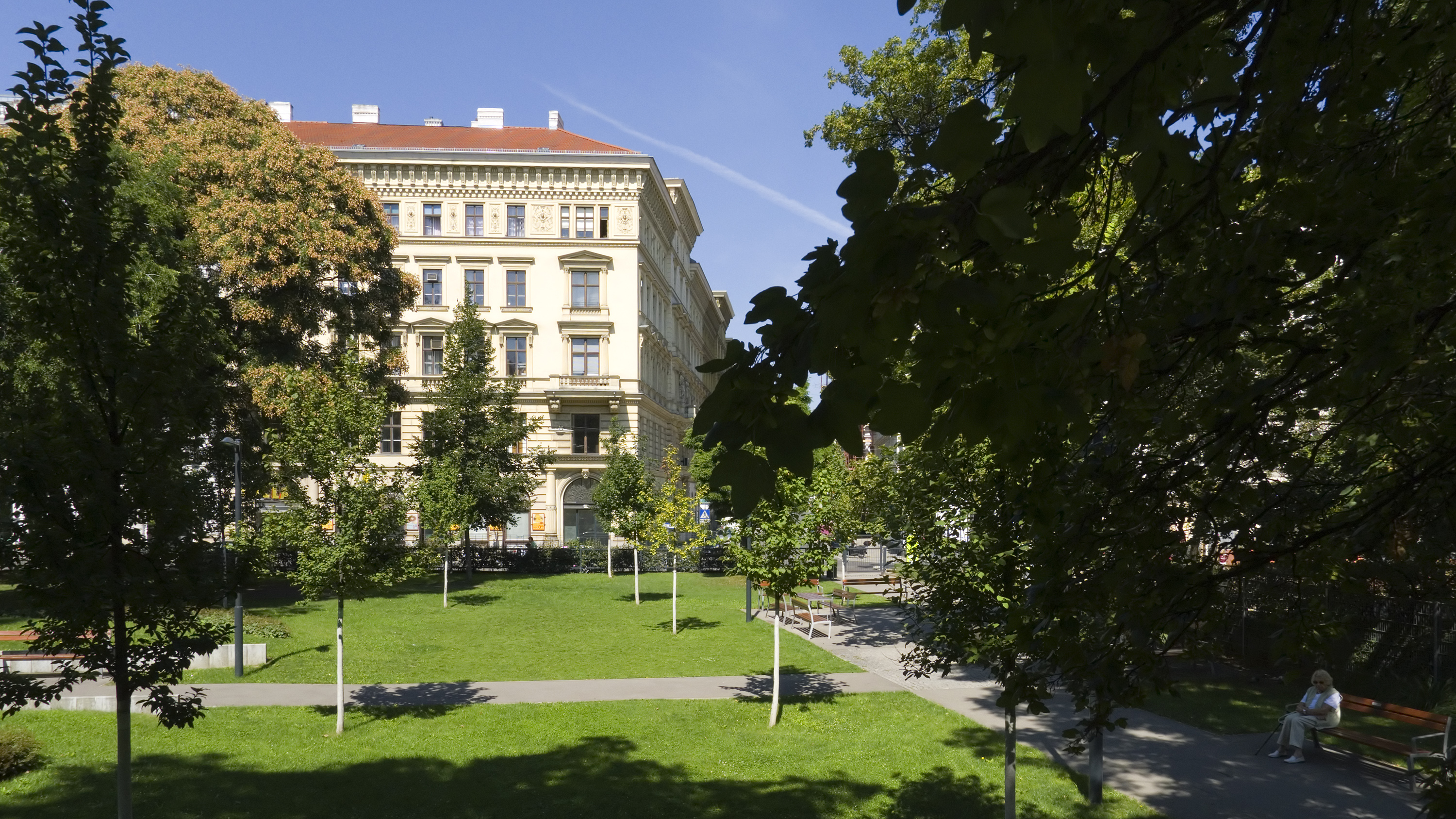 Rudolfsplatz in Wien 1 Richtung Nordwesten